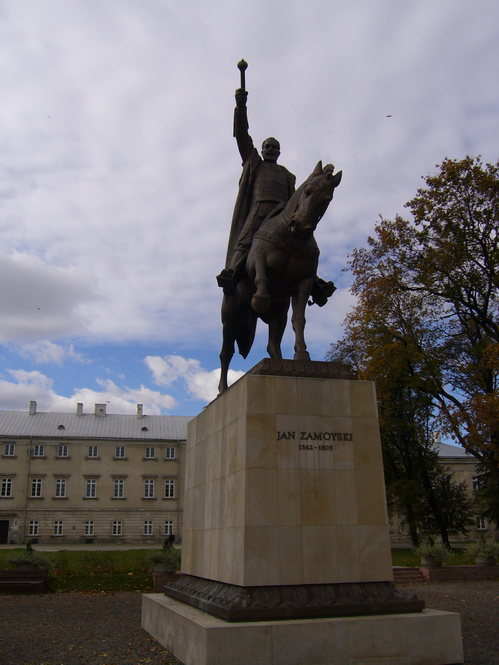 A statue of Jan Zamoyski in Zamość